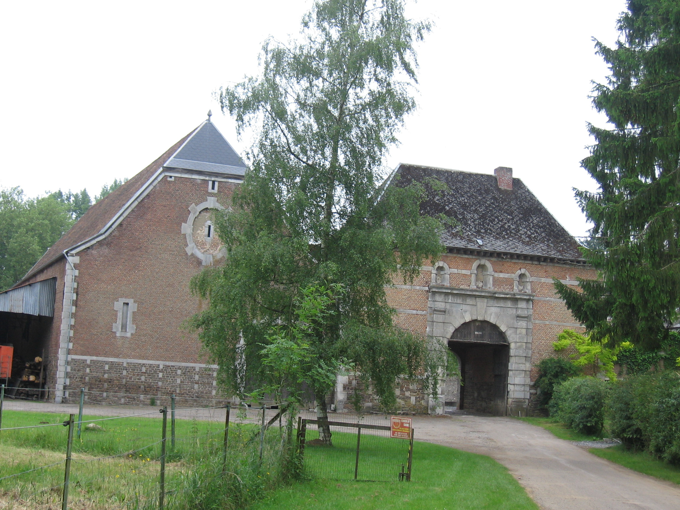 Portail de l'ancienne abbaye cistercienne de Solières en Belgique (province de Namur)